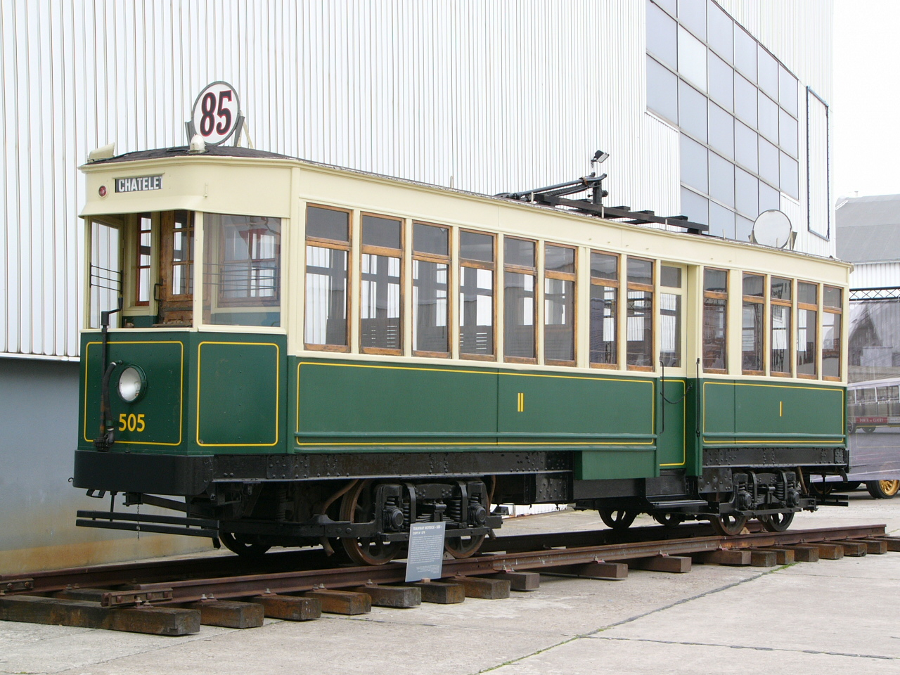 Tramway parisien de 1907, de la CGPT type 500 exposition temporaire sur les transports en Seine Saint Denis au Musée de l'Air et de l'Espace du Bourget, mai 2005